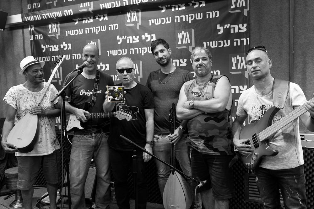 שחר כהן והערק רוקס מתארחים בתכנית של יואב קוטנר